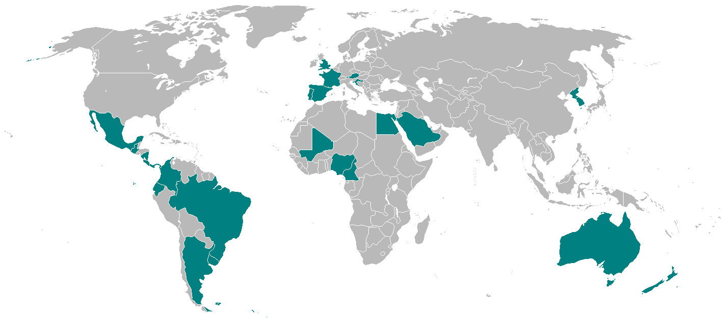 Selecciones clasificadas para disputar el Mundial Sub-20 Colombia 2011.